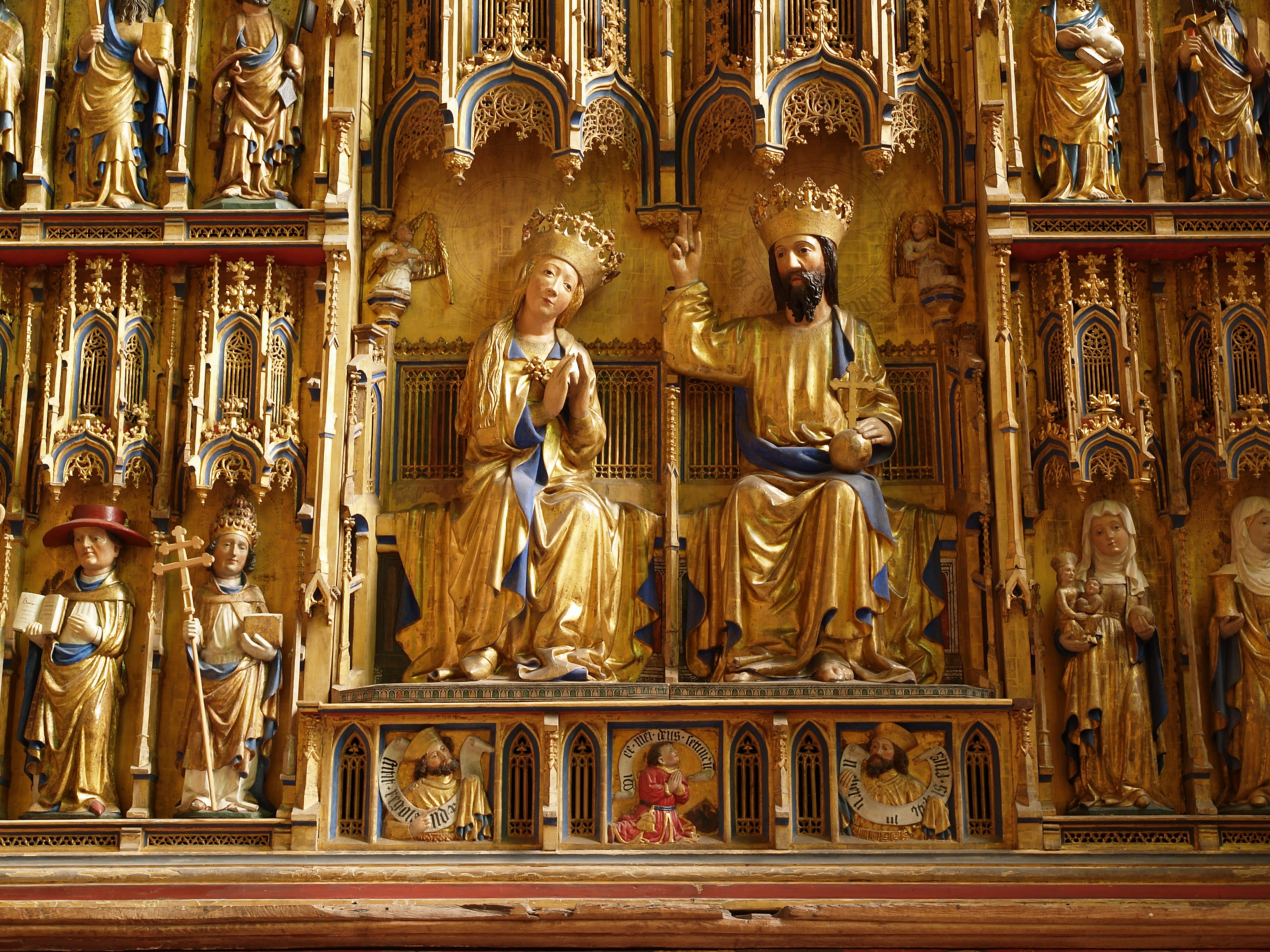 St. Nikolai in Wismar, Detail des Altarretabel von St Georgen im Seitenschiff